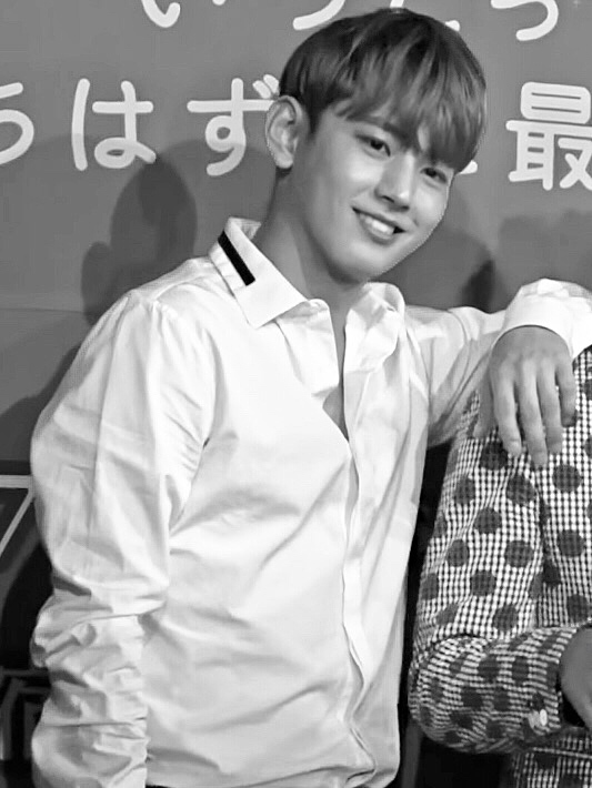 「まねチューブ」チャンネル登録してね♪ 登録はこちら⇩⇩⇩ ホリプロコムに所属するモノマネ芸人による世界最強になりたい 「まねチューブ」メンバー ホリ twitter @horichomateyo 河口こうへい twitter @horiba5586 流コウキ twitter @kkkkoukkkki メルヘン須長 twitter @meruhen_neko ハリウリサ twitter @hahahariu 出演情報・ライブ情報などは・・・ ホリプロコムHP⇩⇩⇩